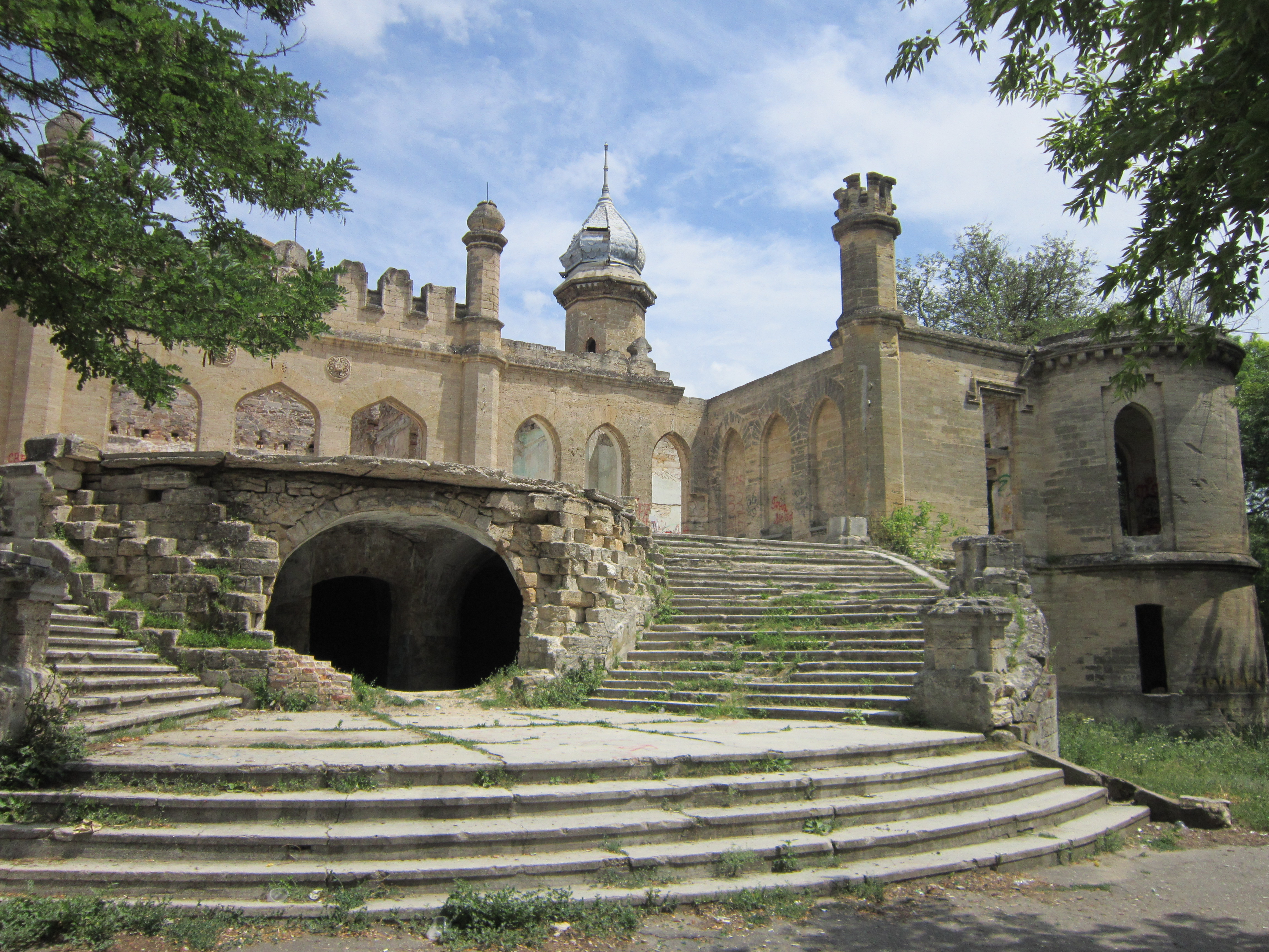 Садиба Куріса, с. Петрівка, Одеська область.